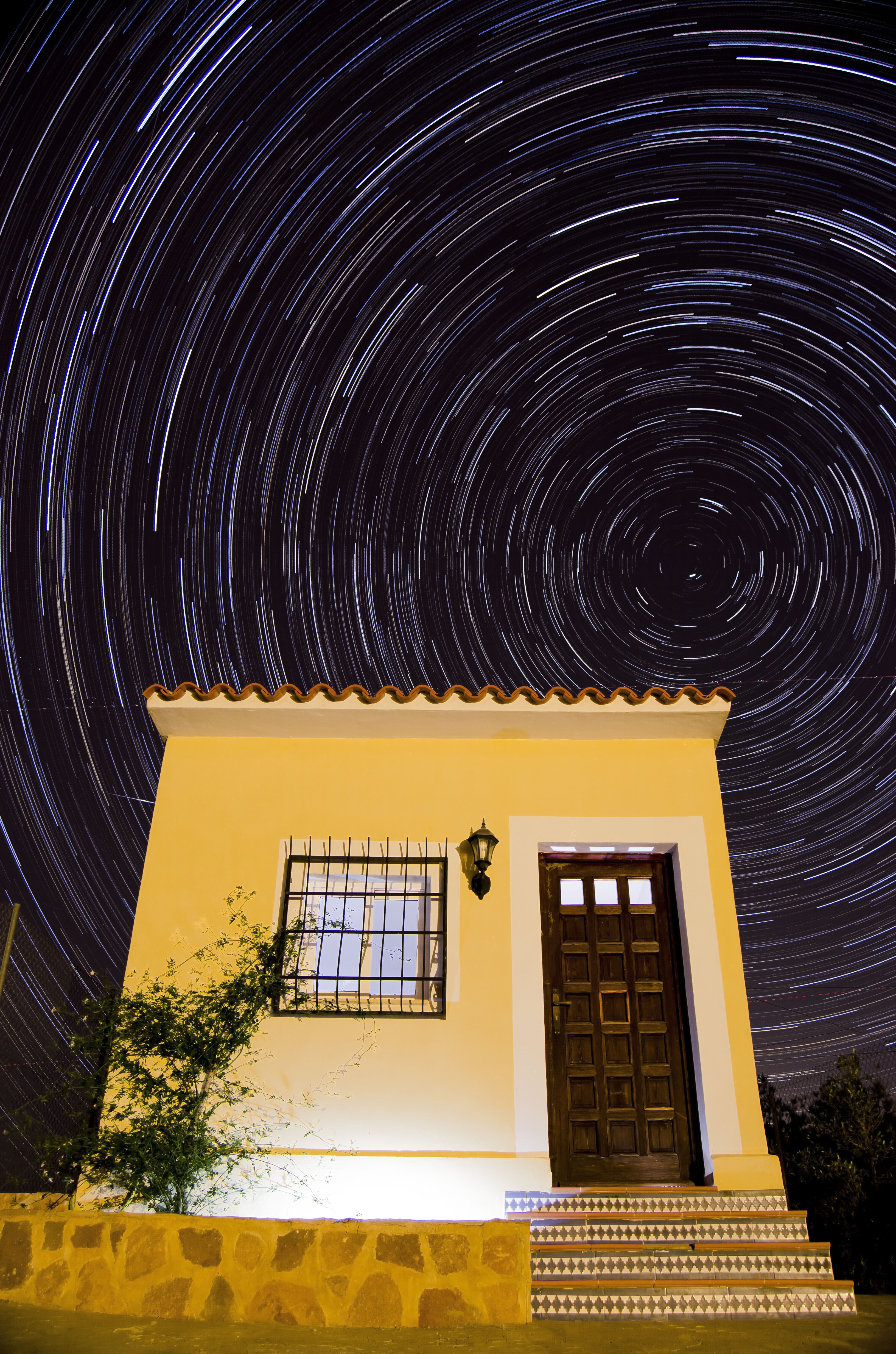 Fotografia feta amb apilament de 144 fotos de 33 segons d'exposició cadascuna. ISO 400, f/5.6. Municipi La Nucia, província Alacant. 08/06/2016